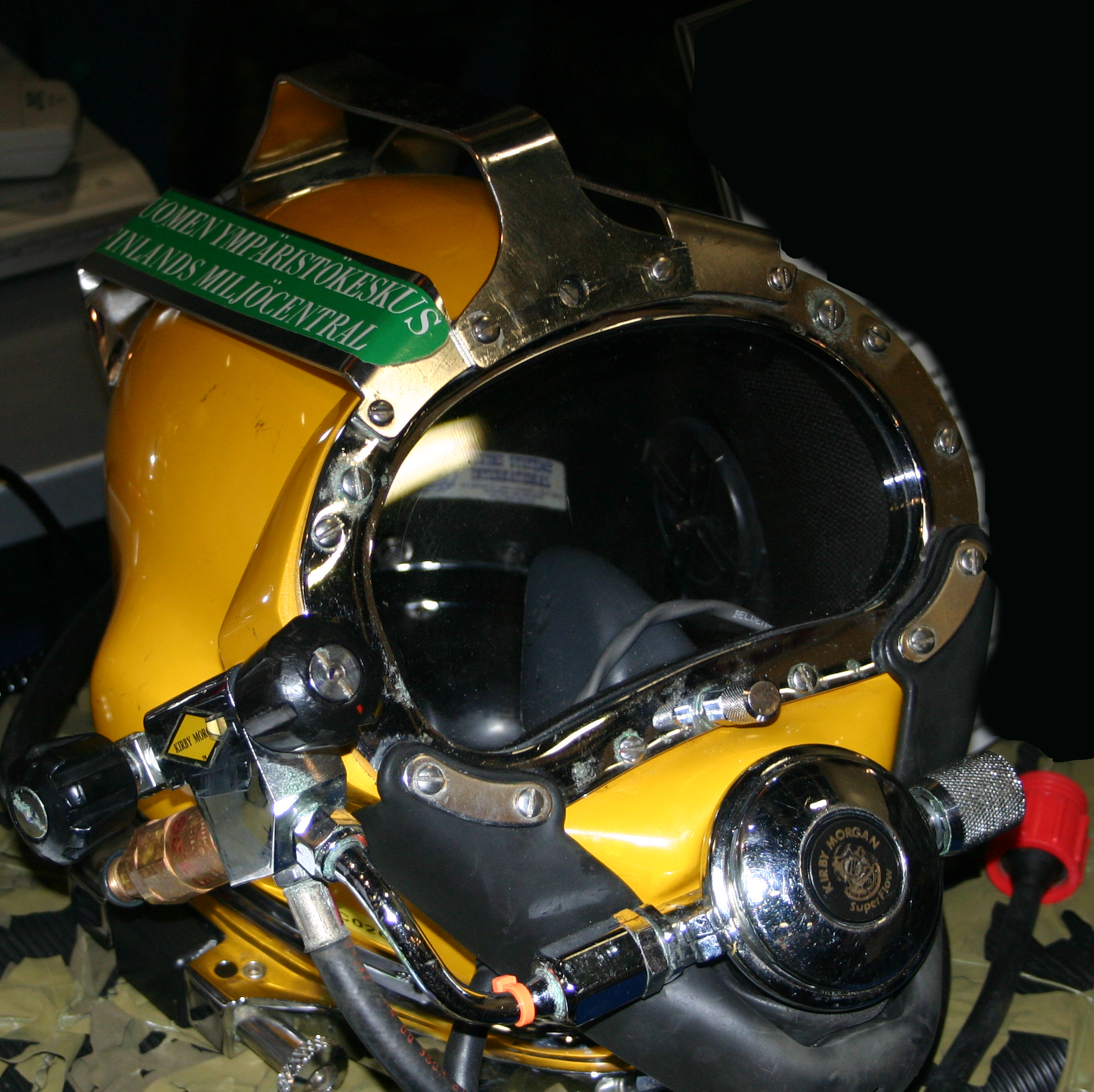 Modern dive helmet